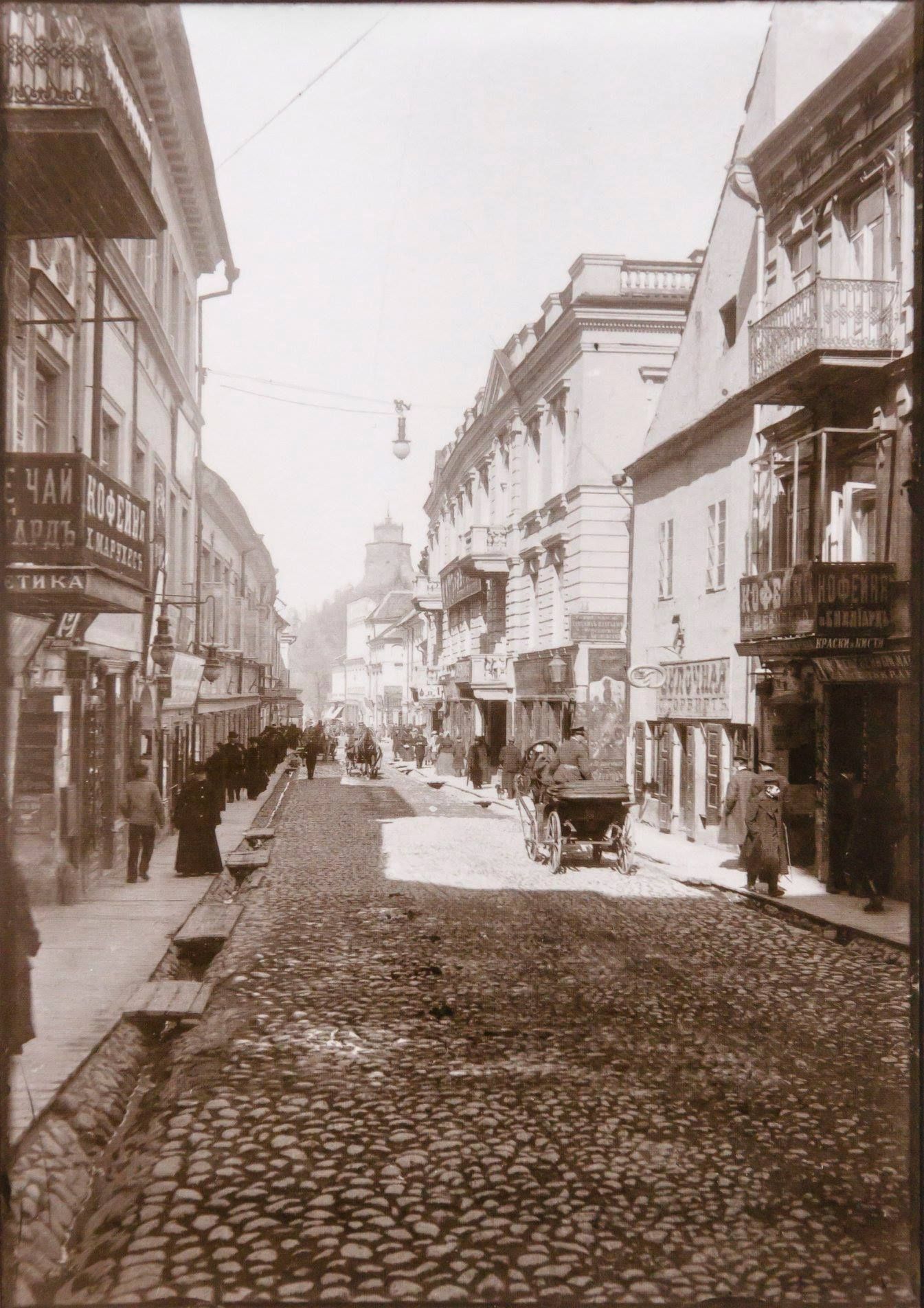 Беларуская (тарашкевіца): Вільня (Vilnia), вуліца Замкавая (vulica Zamkavaja)